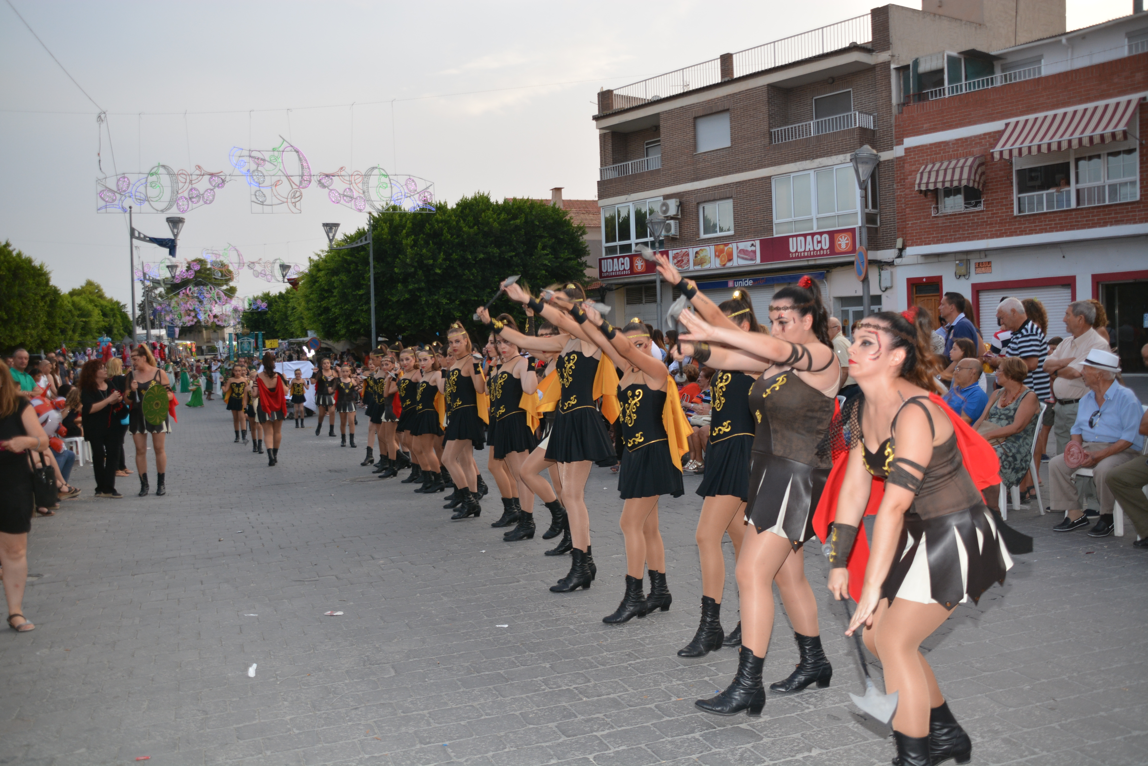 Fiestas de Sodales Ibero-Romanos This is a photography of a Folklore festival in Spain (Wikidata id Q23660934).